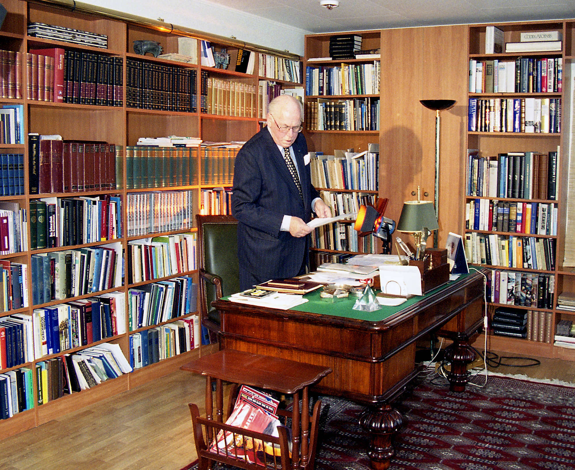 Lennart Meri kodus oma töökabinetis 02